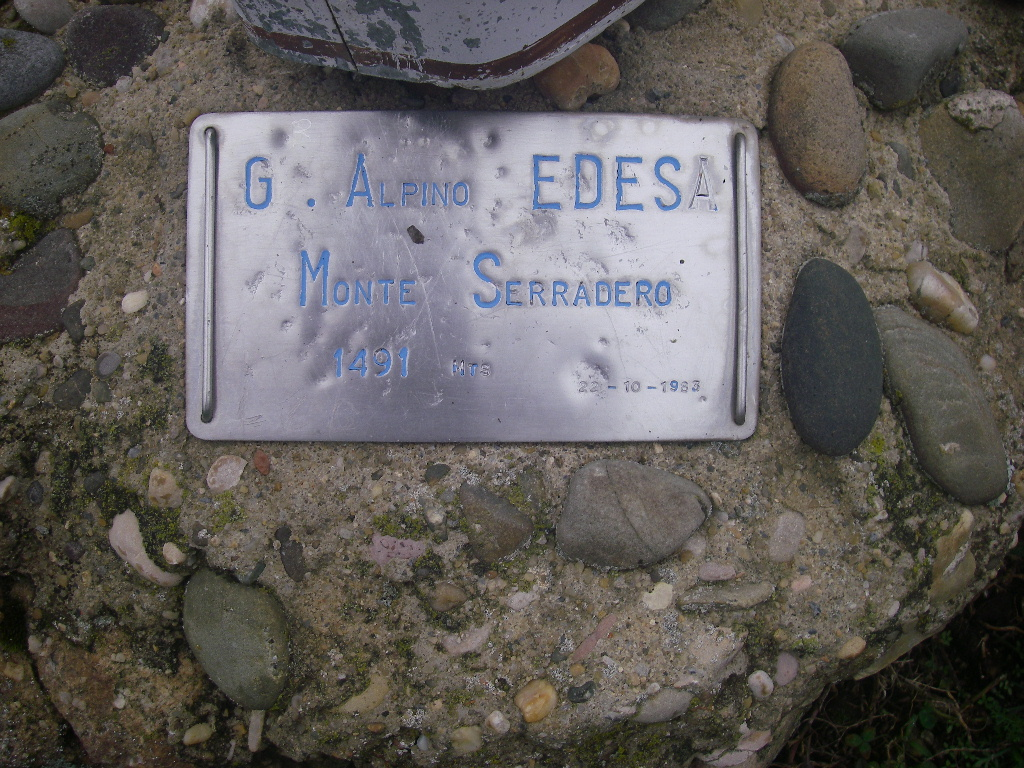 Cota del Monte Serradero (La Rioja, España)